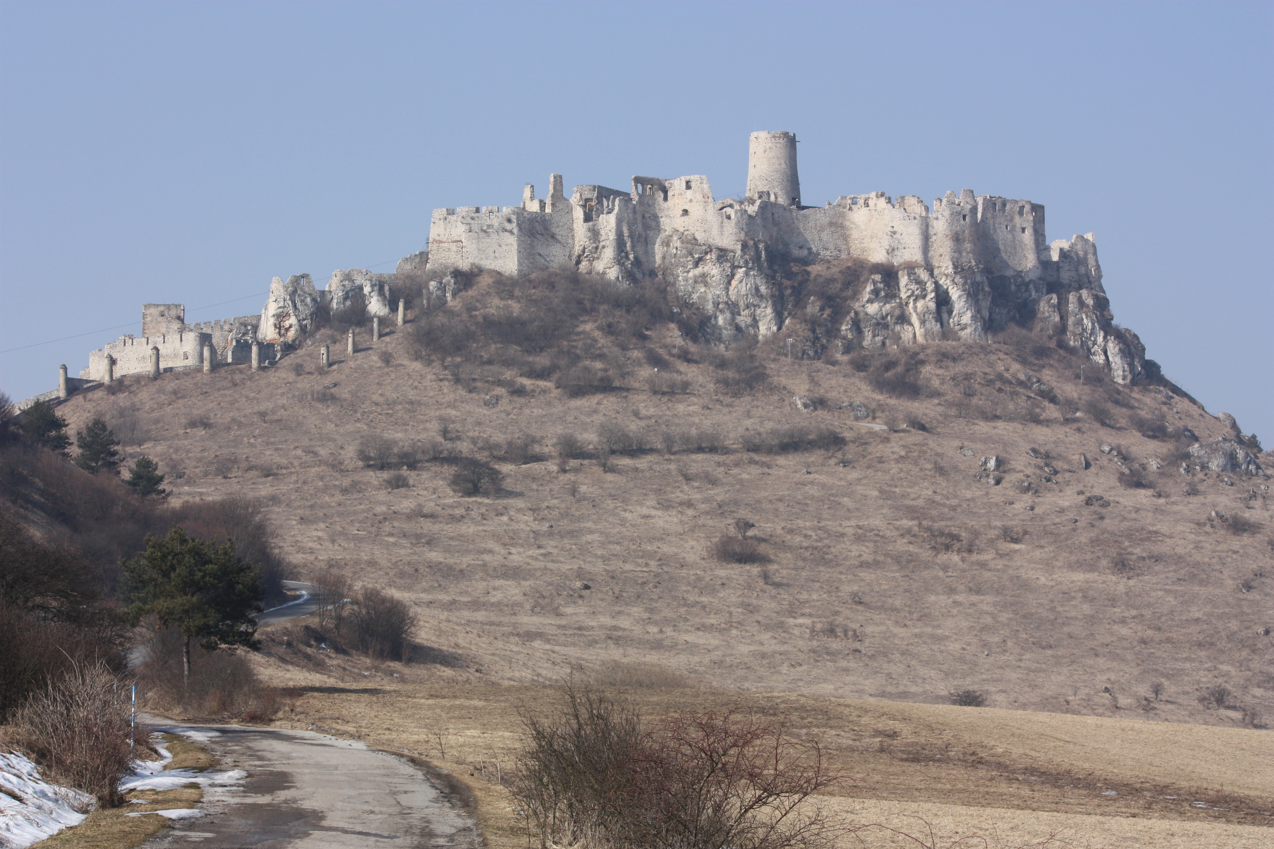 Spiš Castle